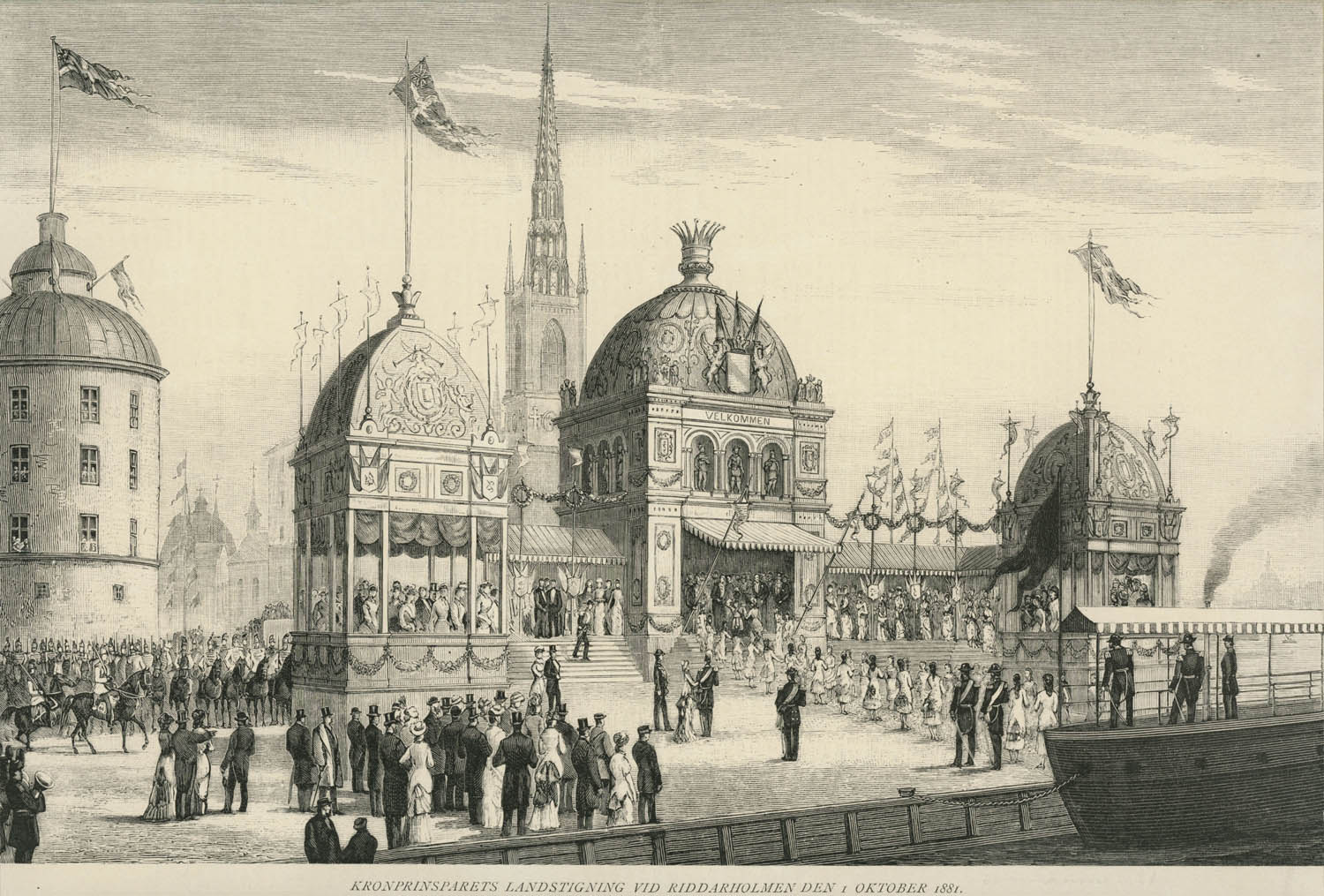 Depicted person: Gustav V, Kung av Sverige 1907-1950, Sverige (1858-06-16-1950-10-29); Gustaf V (alternativ stavning); Mr G (pseudonym); Viktoria, Drottning av Sverige 1907-1930 (1862-08-07-1930-04-04); Victoria av Baden (namn som ogift); Victoria (alternativ stavning) Depicted place: Stockholm, Riddarholmen (Sverige (SE))